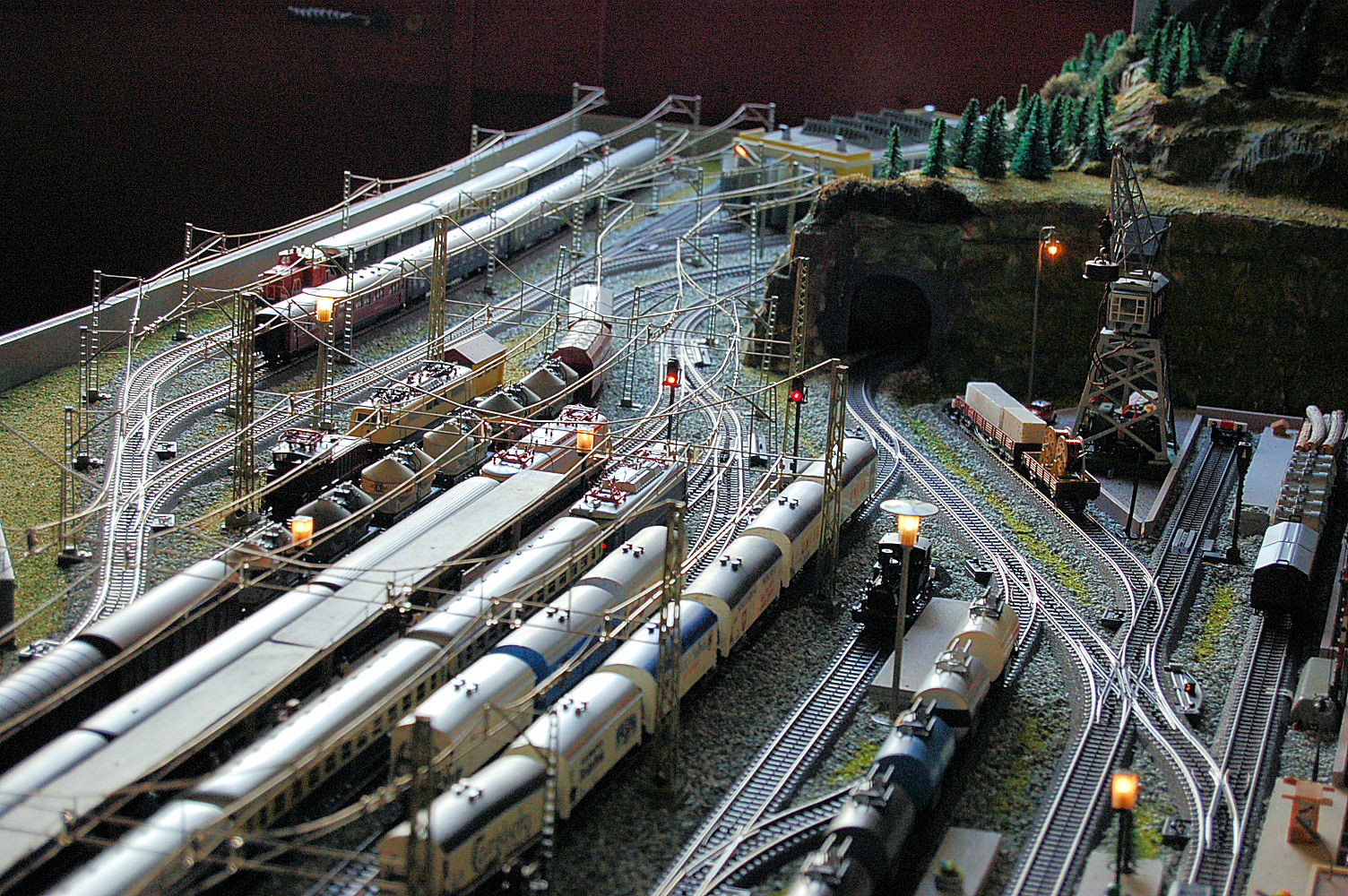 Un plastico ferroviario in scala H0 (materiale Märklin)